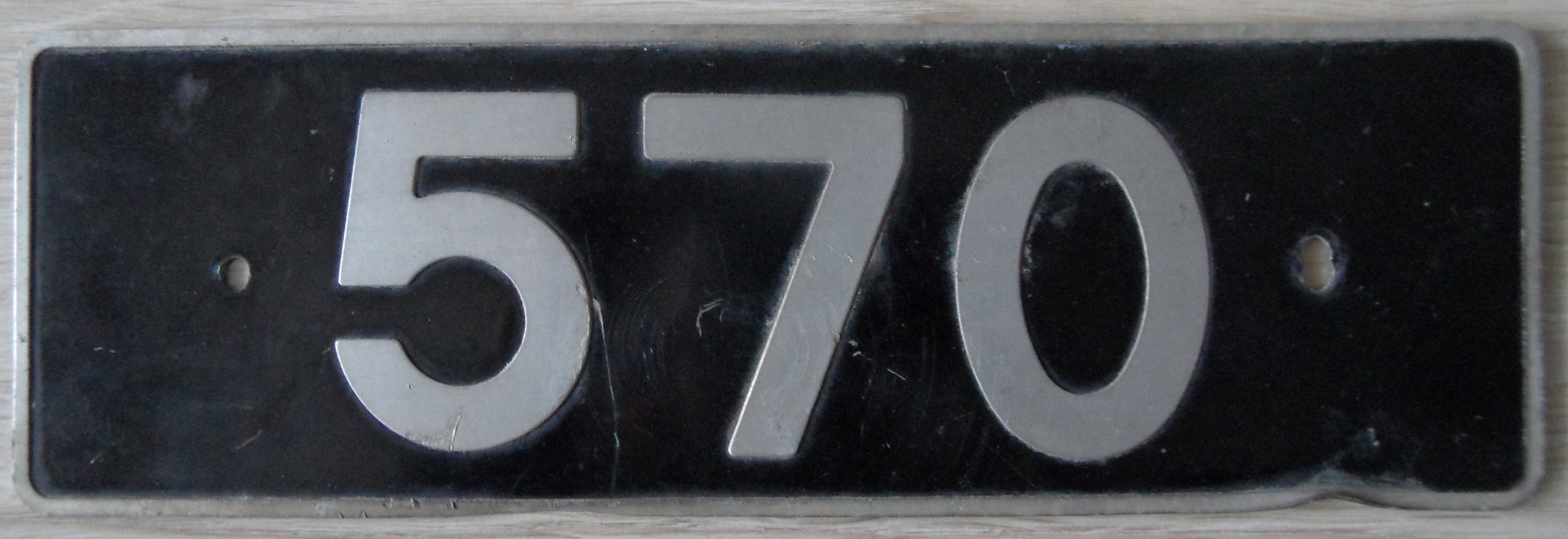 Tablica rejestracyjna, Dominika